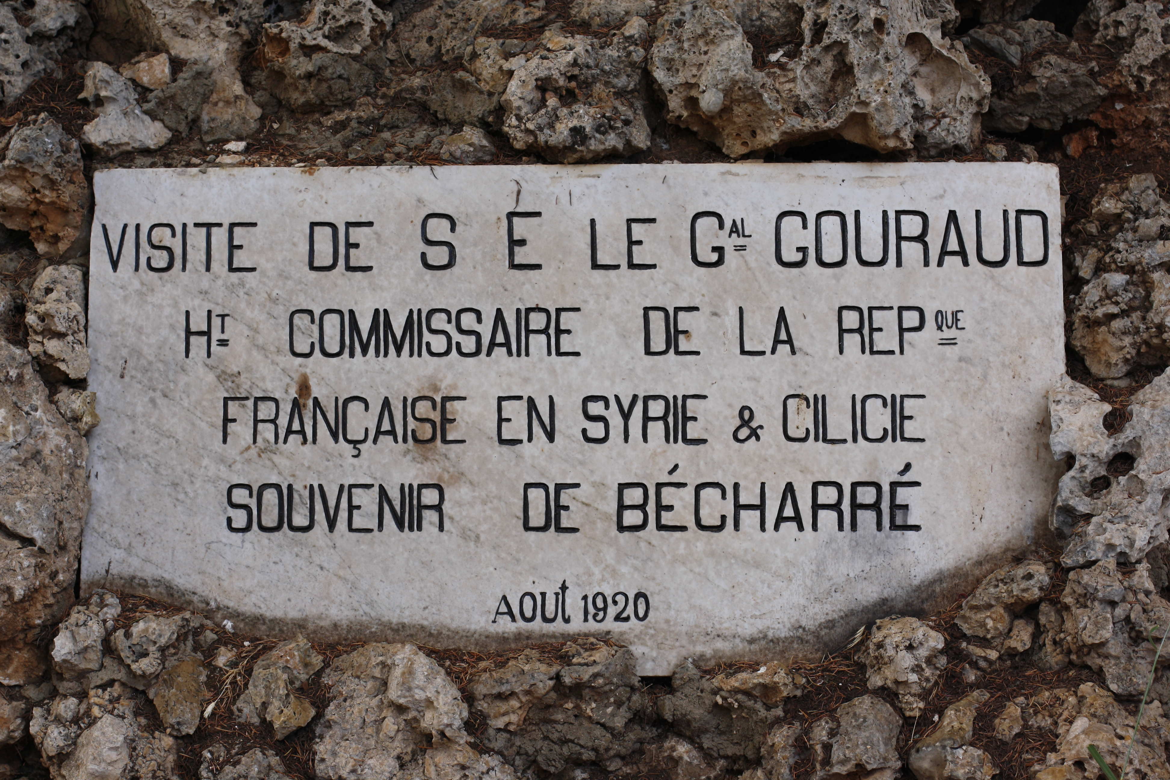 Plaque commémorative française VISITE DE S E LE Gal GOURAUDHt COMMISSAIRE DE LA REPqueFRANÇAISE EN SYRIE & CILICIESOUVENIR DE BÉCHARRÉAout 1920